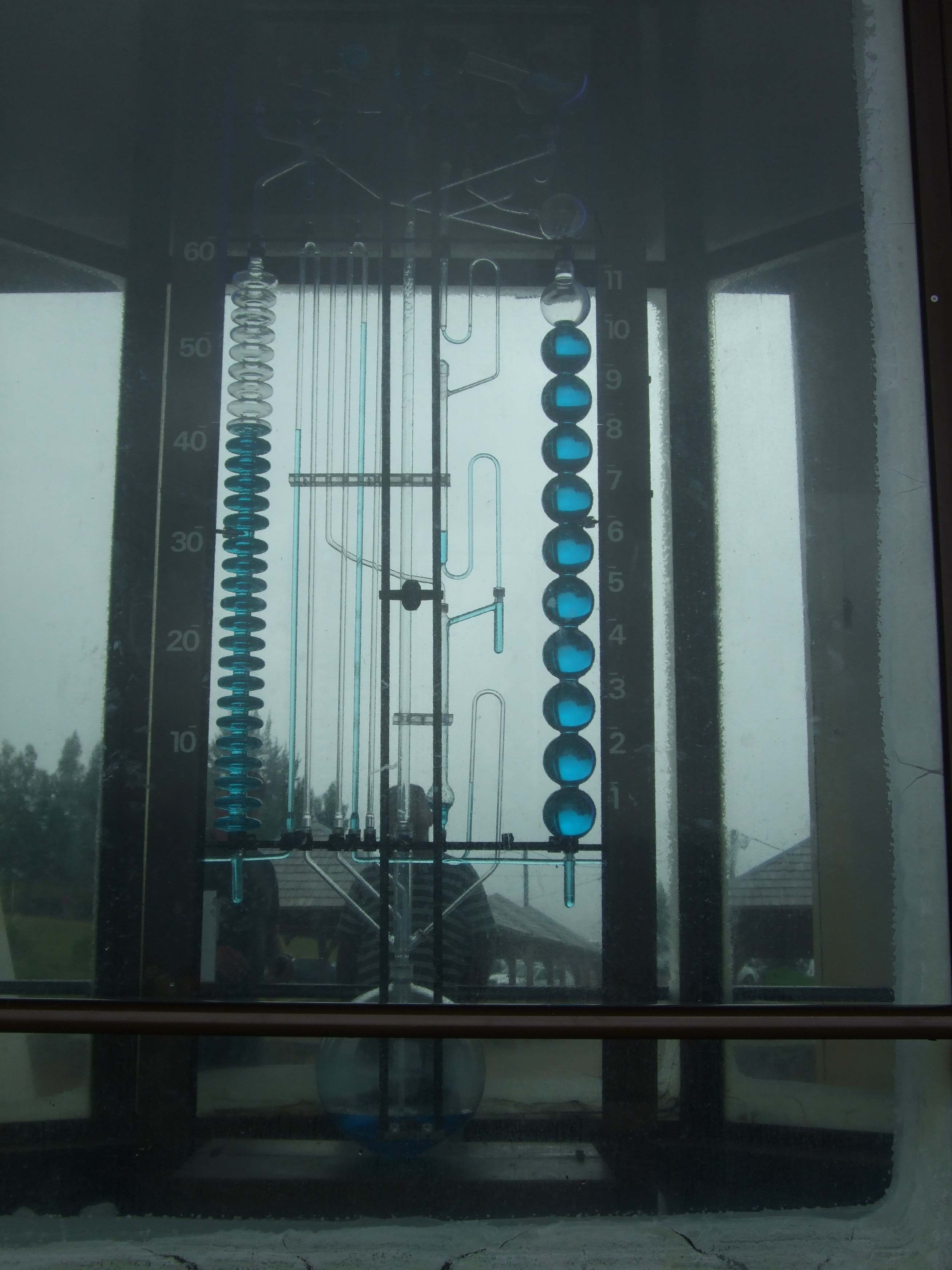 Il s'agit de l'horloge hydraulique de La Réunion